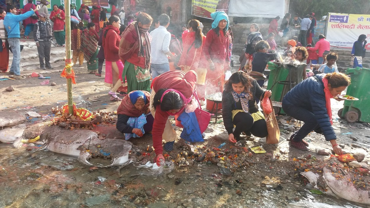 नेपाली: शाली नदीमा माघ महिनामा लाग्ने मेलामा सहभागी दर्शनार्थीहरु